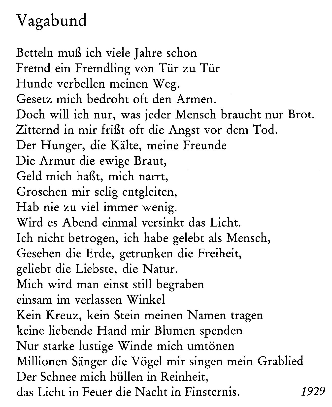 Sepp Mahler, Gedicht, Vagabund, 1929, Druck